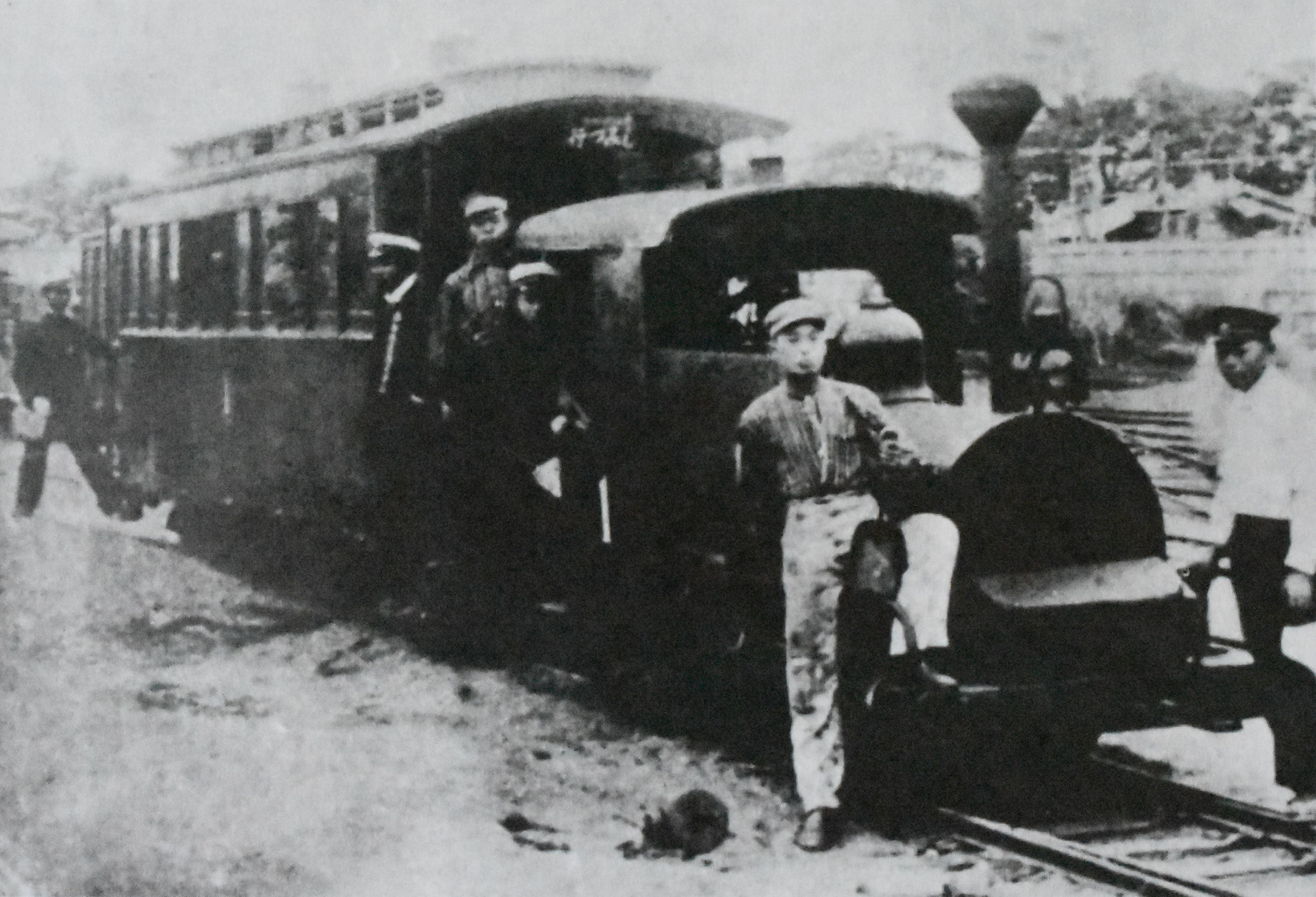 大日本軌道小田原支社から転入したボールドウィン製小型蒸気機関車。鷹匠町駅、明治41年7月（岡本憲之『軽便鉄道時代』より）。